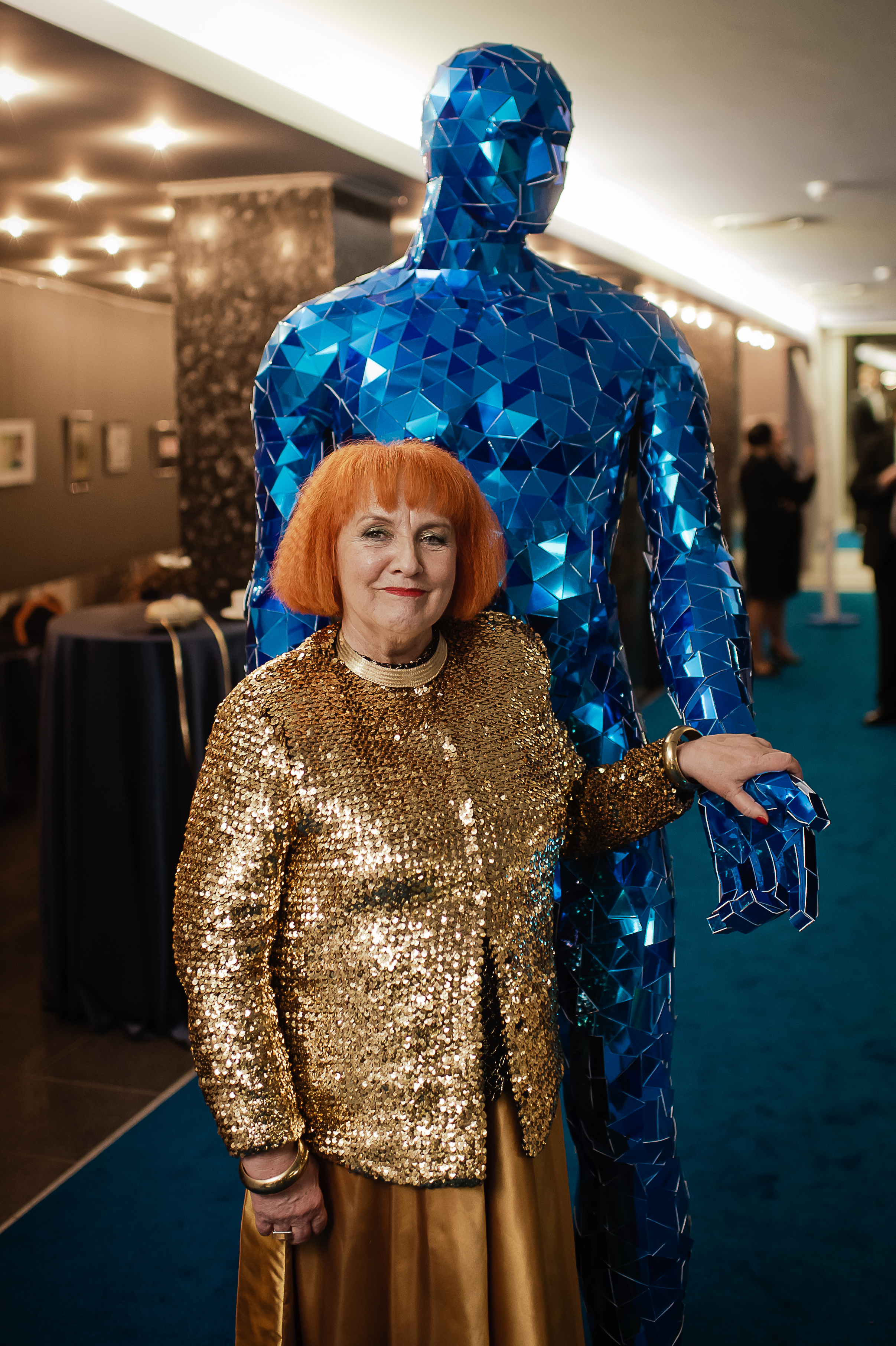 Kujunduskunstnik Maile Grünberg presidendi vastuvõtul.